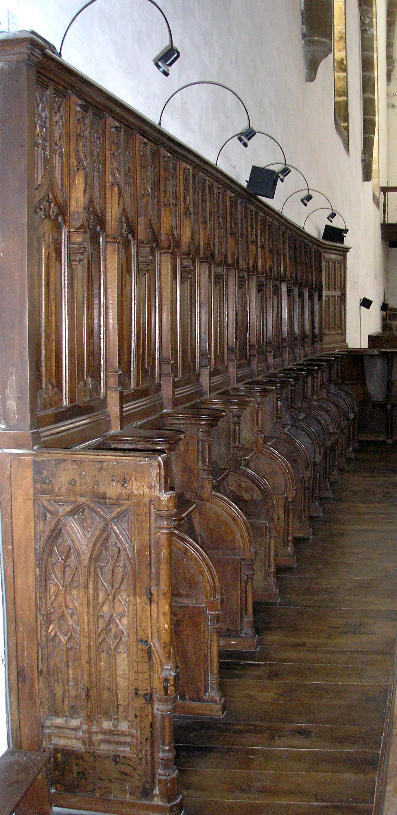 Mortain (Normandie, France). Stalles de l'abbaye Blanche.